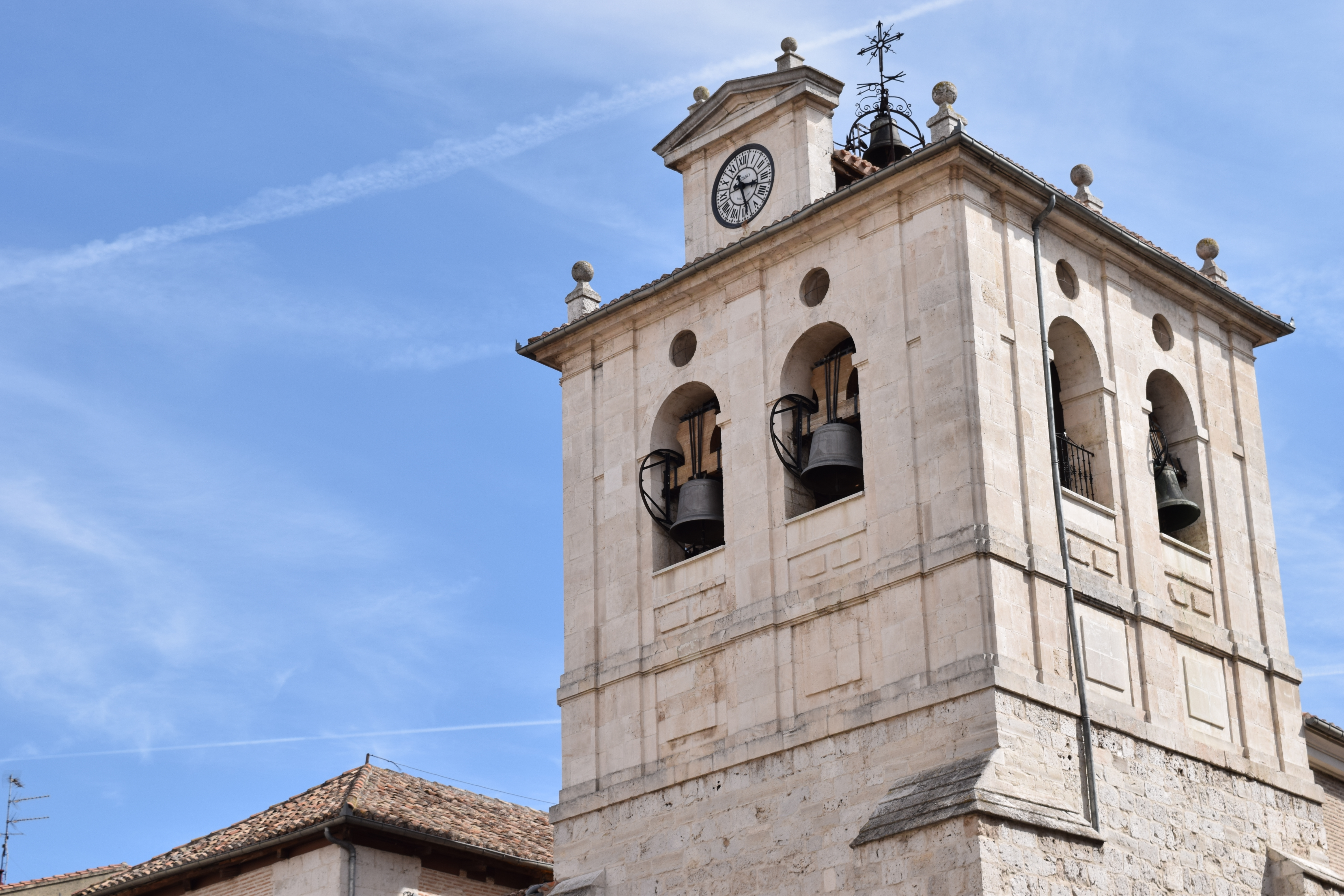 San Cosme y San Damián (Burgos) Campanario